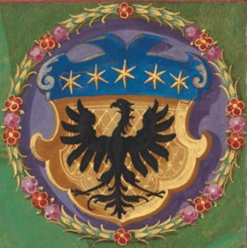 Wappen des Amts Grüningen im Seehbuch von Jacob Ramminger in der Karte mit dem Titel Der schön und lustig See zu Egelshaim bey der Vestung Hohen Asperg in Grüninger Ampt und Vogtey gelegen.